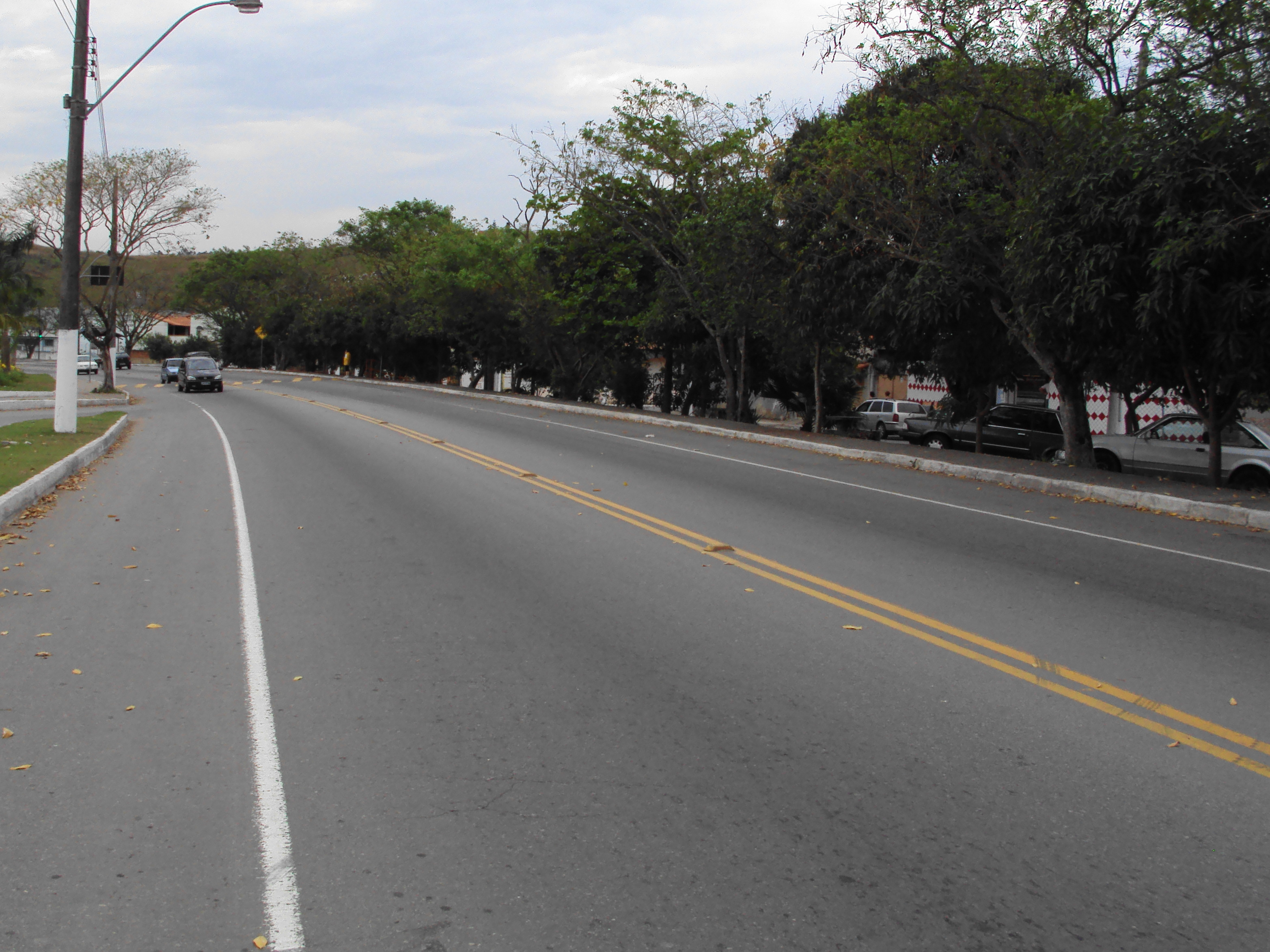 Foto da Rodovia dos Metalúrgicos, em Volta Redonda (RJ), que liga o Centro do município até a Rodovia Presidente Dutra.